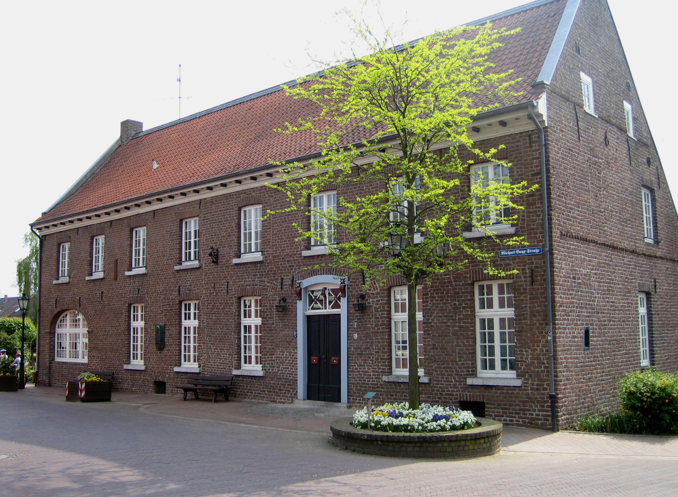 Michael-Buyx-Haus in Kerken-Nieukerk